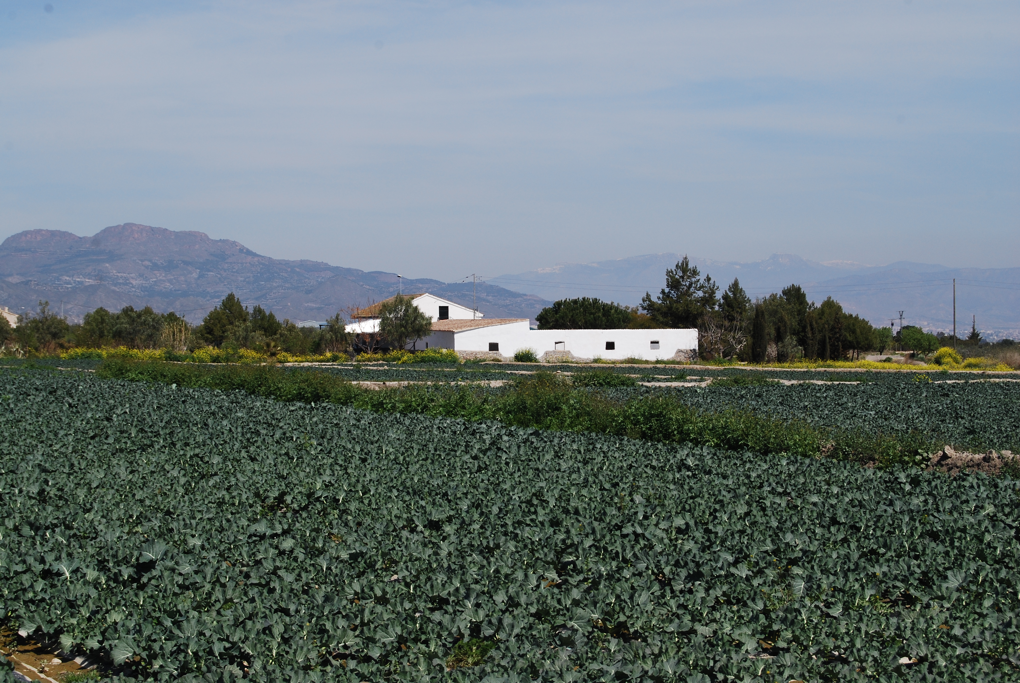 Vista del paisaje característico de la pedanía de El Esparragal (Puerto Lumbreras)